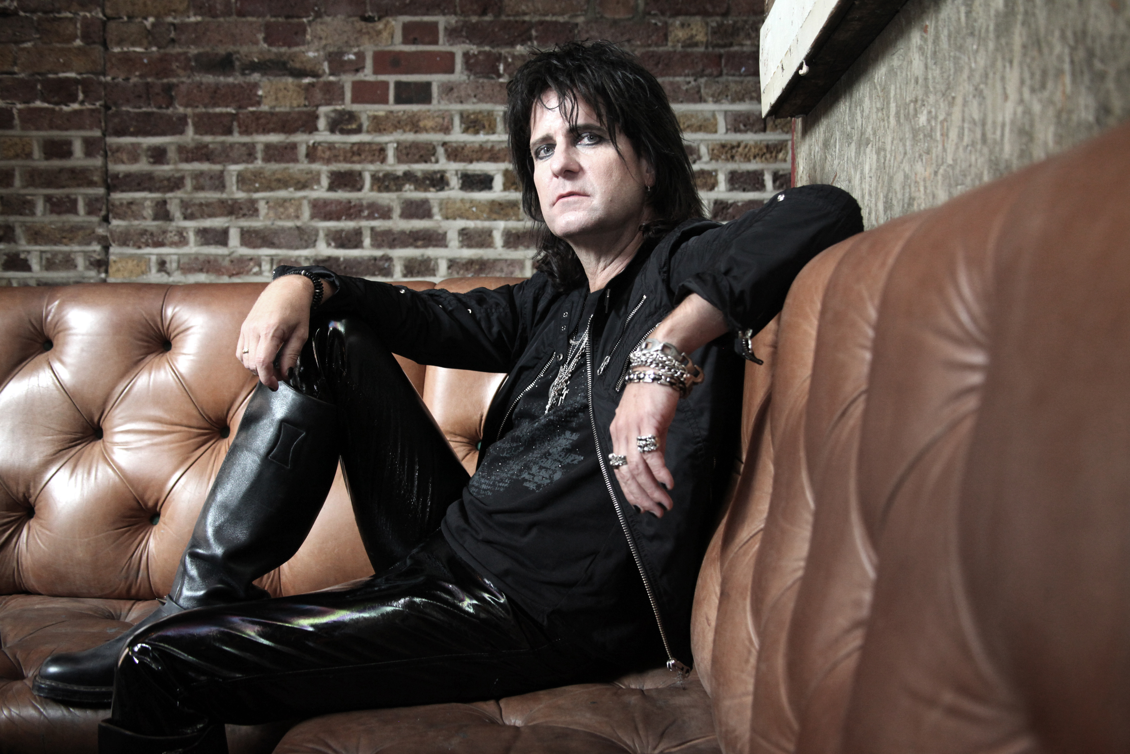 Artisten Kee Marcello.